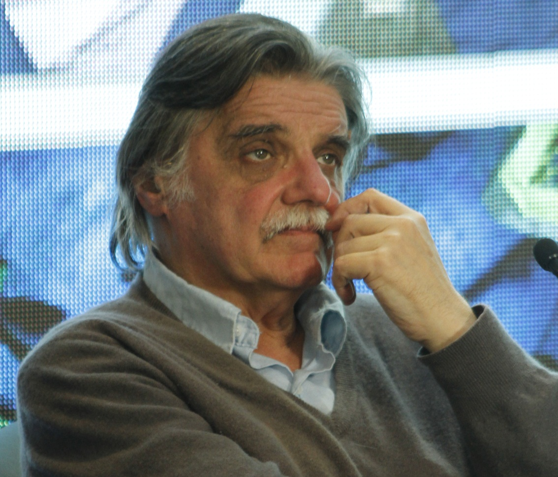 El sociólogo y filósofo argentino, director de la Biblioteca Nacional, Dr. Horacio González